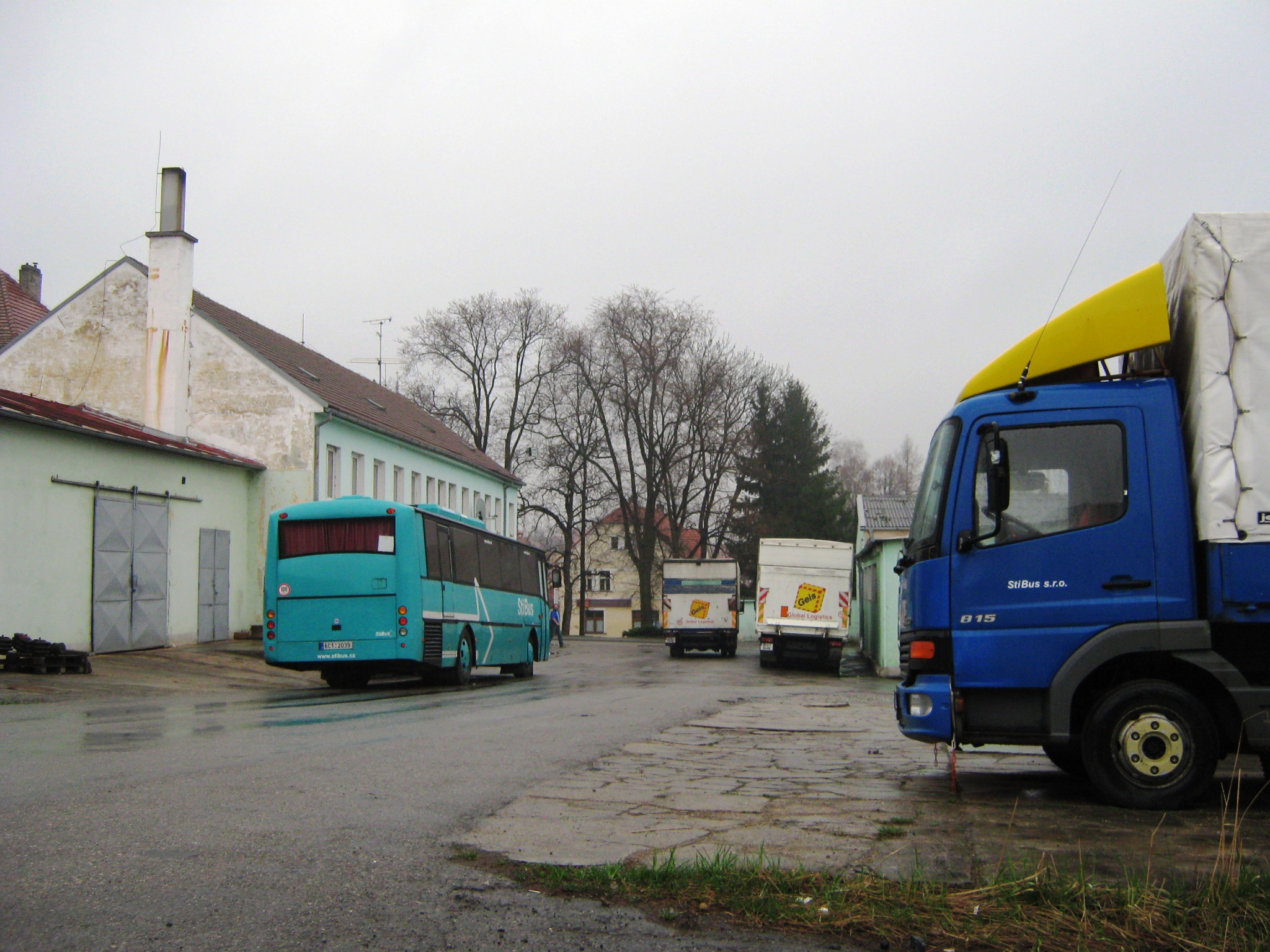 Pohled na odstavnou plochu sídla firmy StiBus